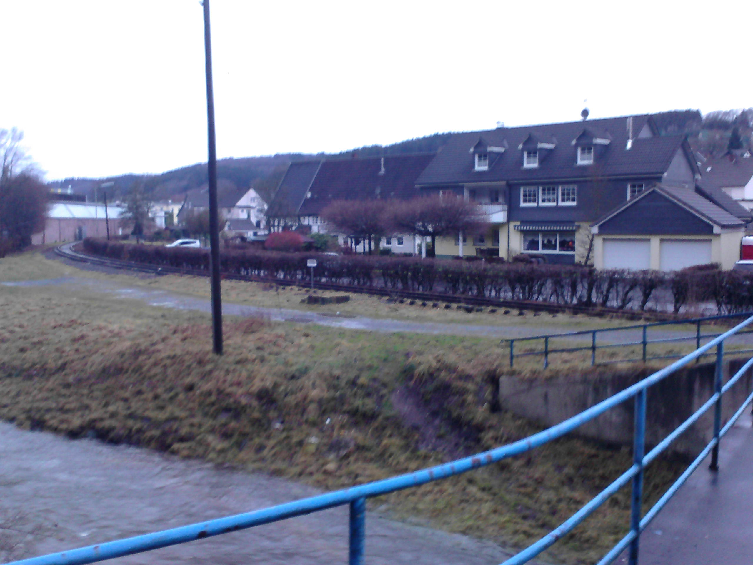 Bahnübergang über die Derschlager Alpestraße am 26. Dezember 2012